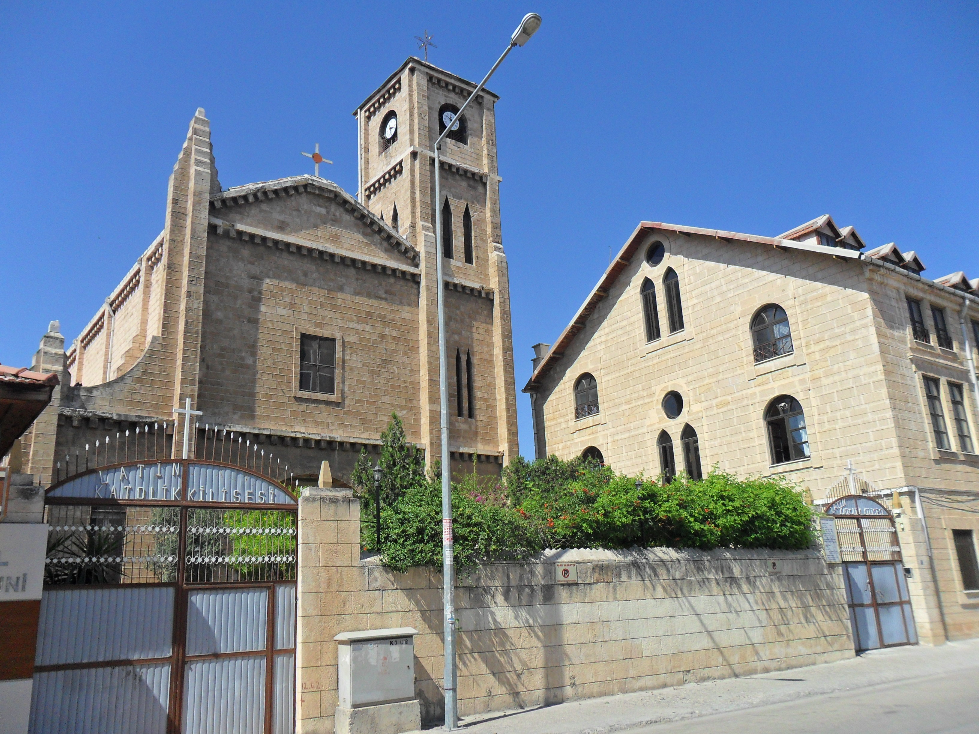 Mersin merkezde yer alan Sent Antuan Latin Katolik Kilisesi'nin ön cepheden görünüşü.